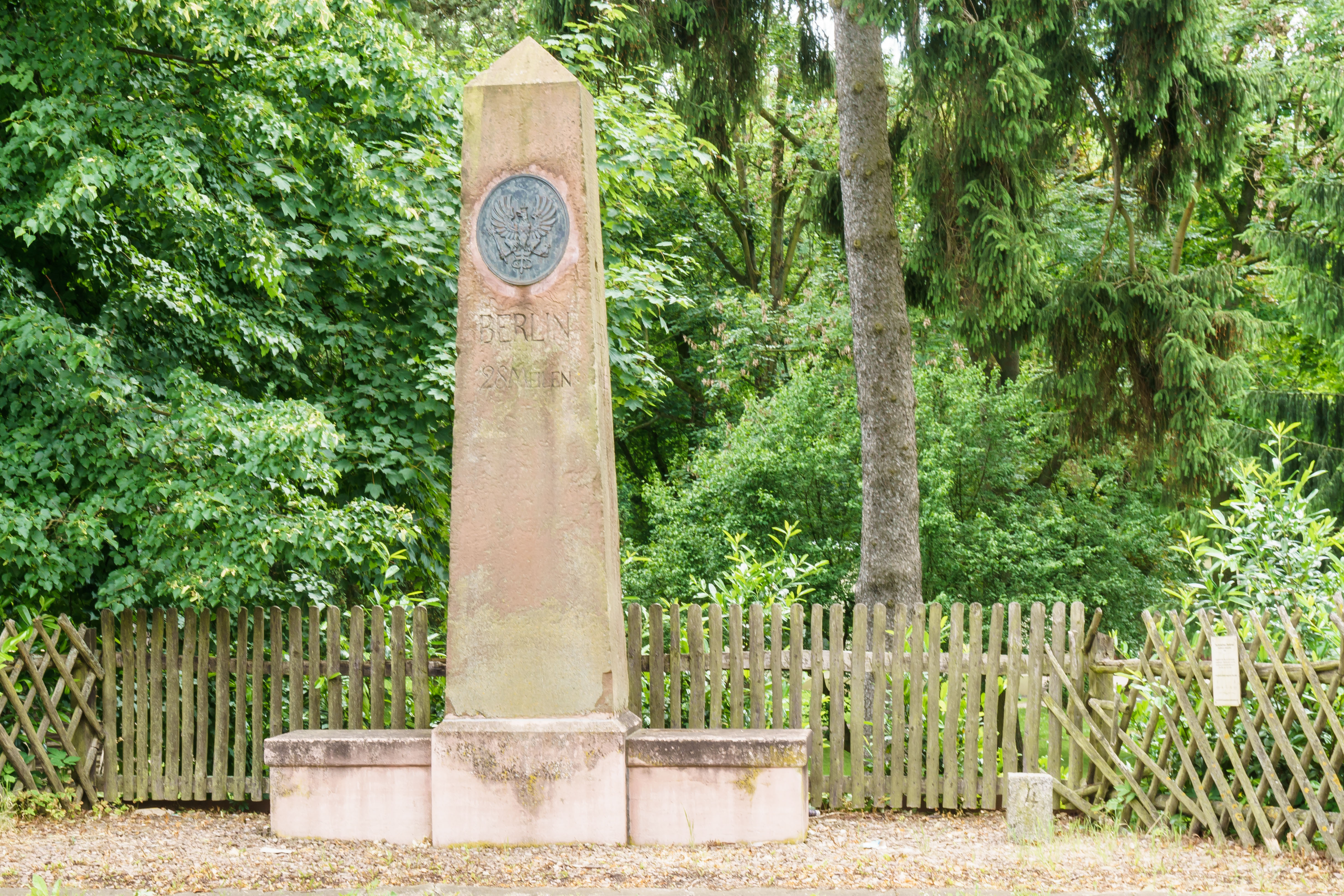 Preußischer Ganzmeilenobelisk (0493) mit Sitzbank an der L 151 in Emseloh. Inschrift: BERLIN 28 MEILEN ; EISLEBEN 1 ½ MEILE ; SANGERHAUSEN 1 1/8 MEILE